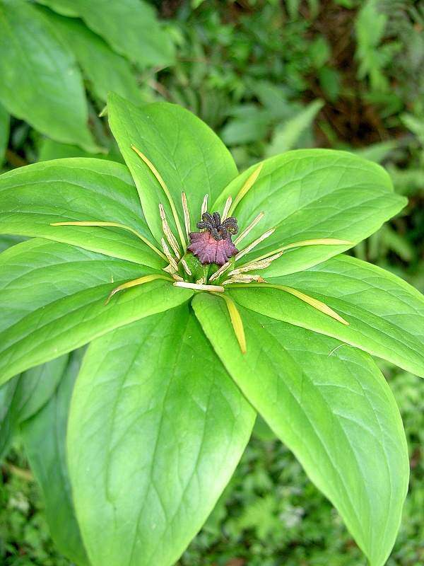 Paris polyphylla（七葉一枝花）, Taipei, 2008.